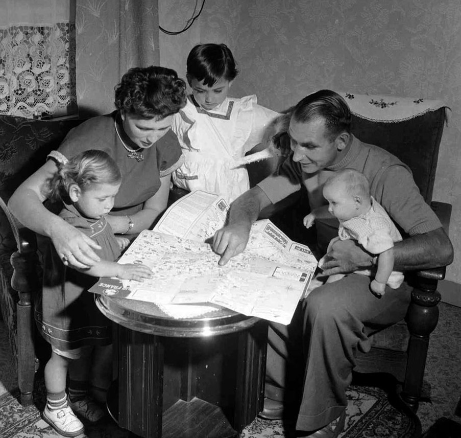 Uit de reportage Nederlandse wielrenners klaar voor de Tour de France. Wim van Est laat zijn gezin op de kaart van Frankrijk zien waar hij heen gaat met de Tour de France, Sint Willebrord, 1 juli 1954 Foto Ben van Meerendonk / AHF, collectie IISG, Amsterdam